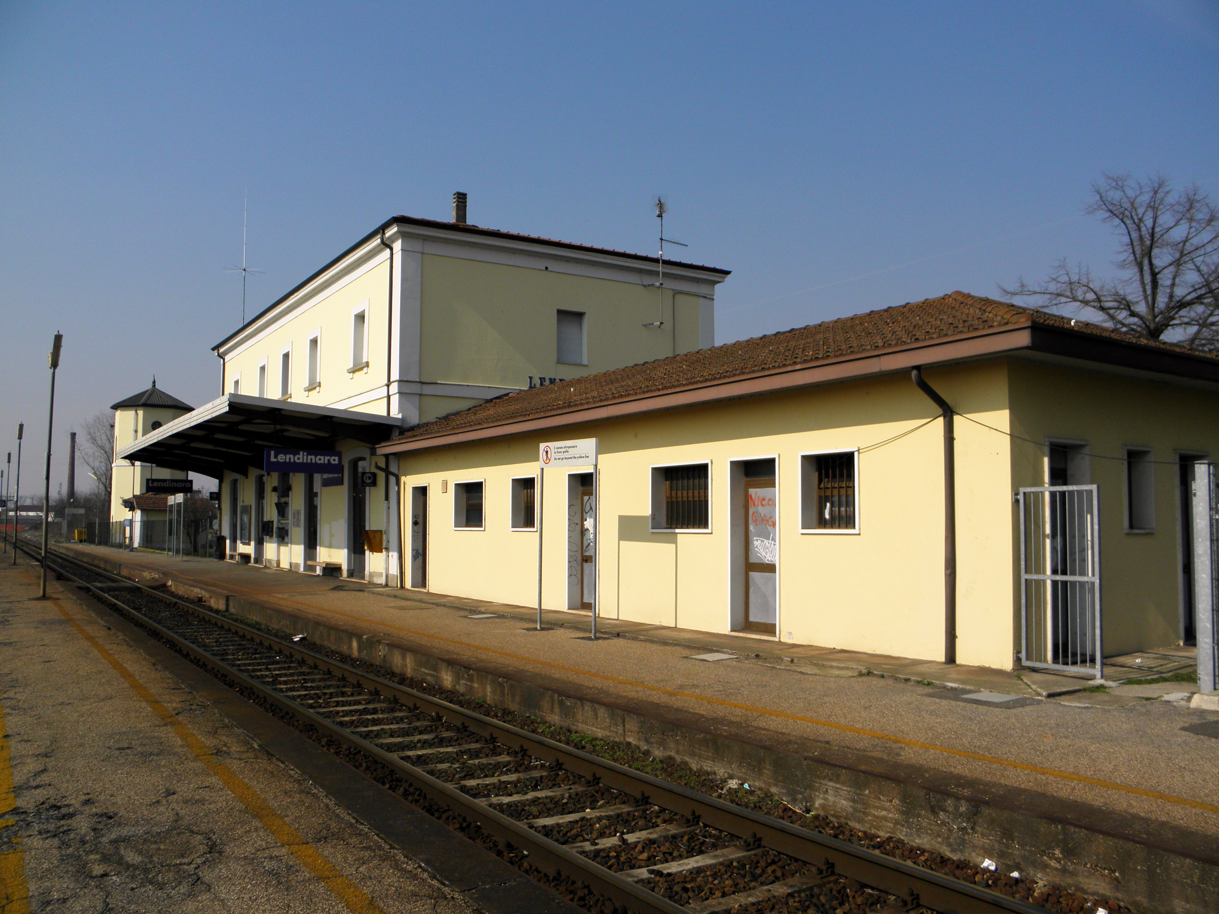 Lendinara: la stazione ferroviaria lato ferro.